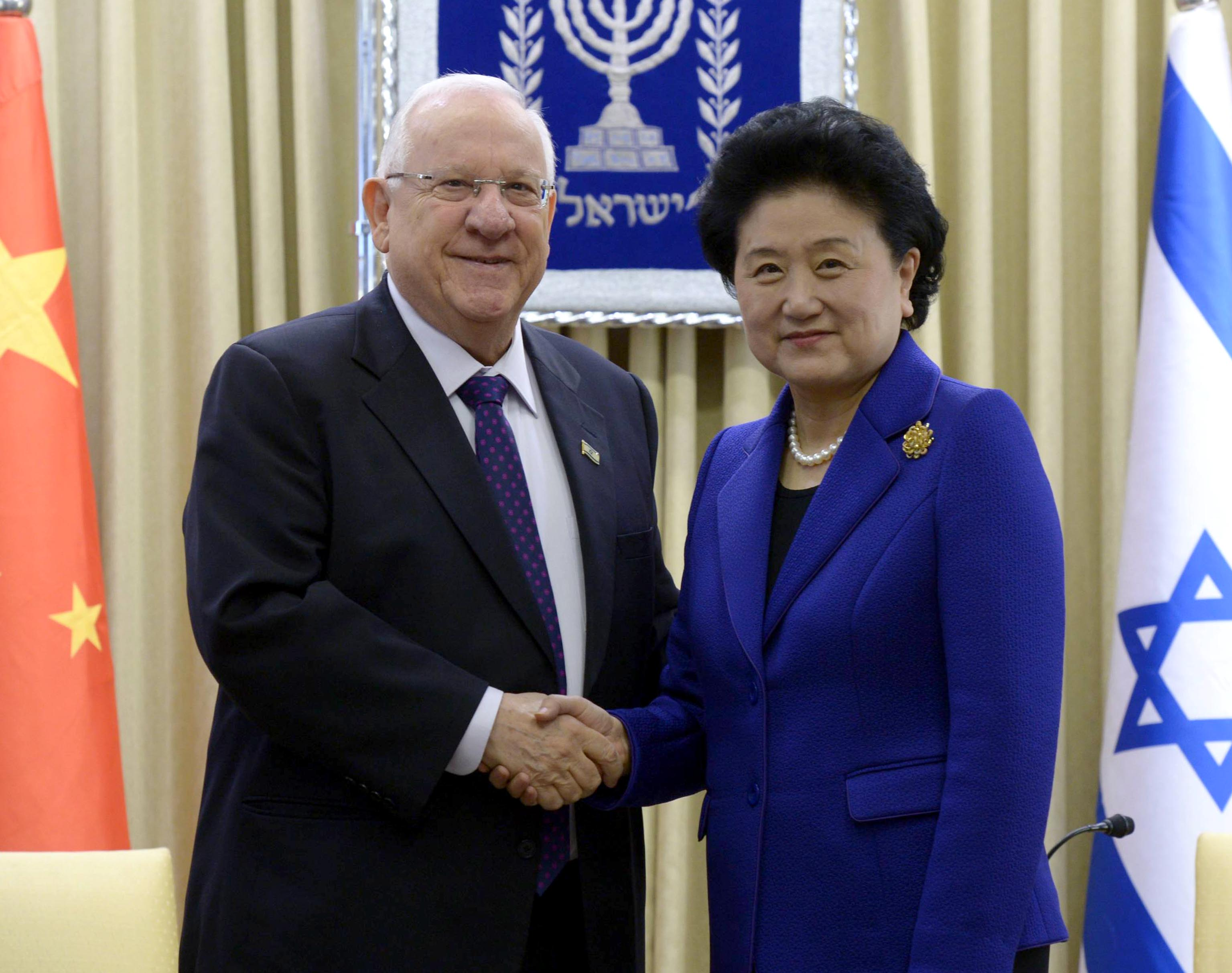 ראובן ריבלין עם סגנית ראש ממשלת סין ליו לנדונג בביקור בישראל